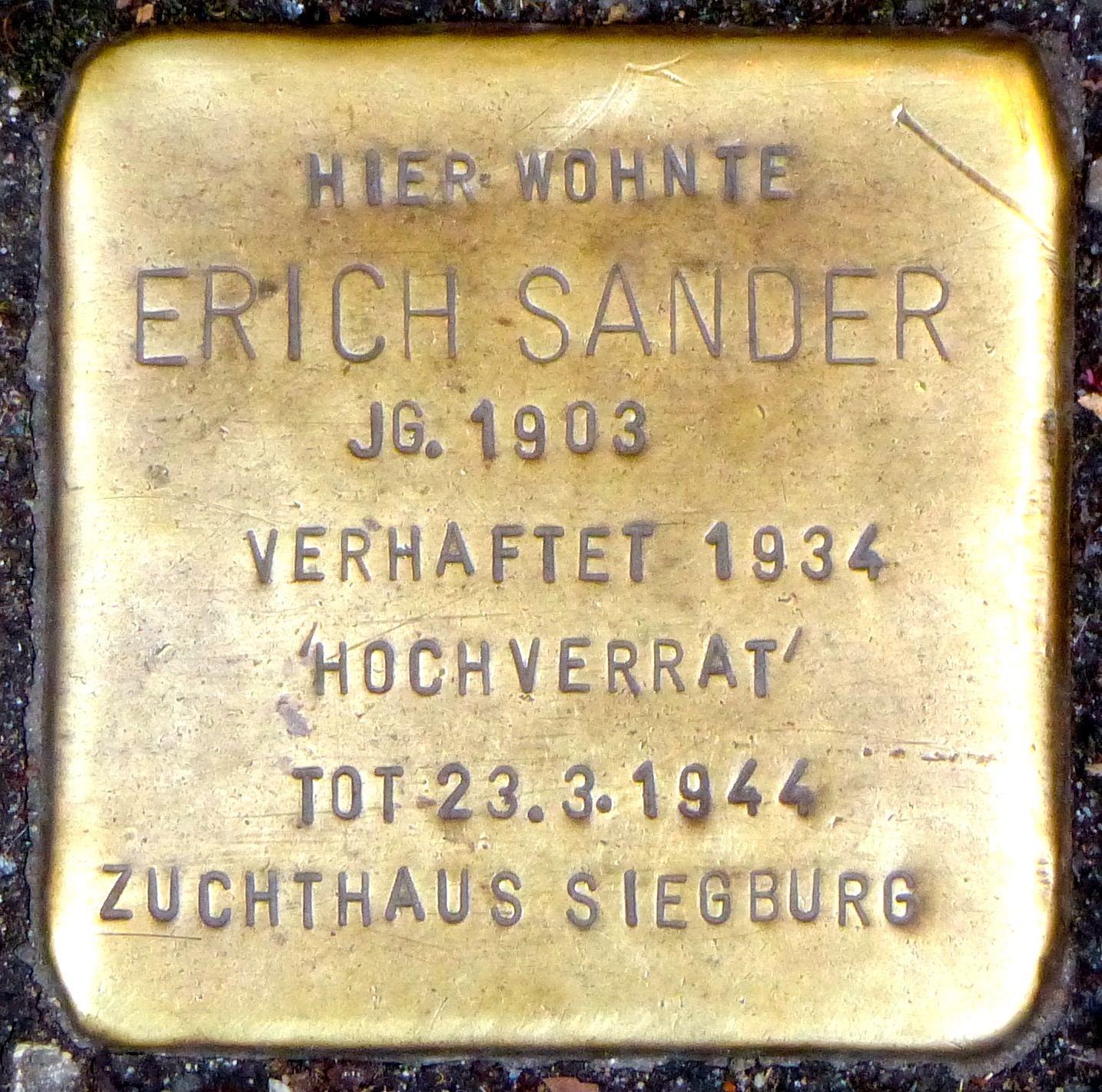 Stolperstein für Erich Sander (Sohn des Fotografen August Sander), Dürener Straße 201, politischer Gefangener im Zuchthaus Siegburg